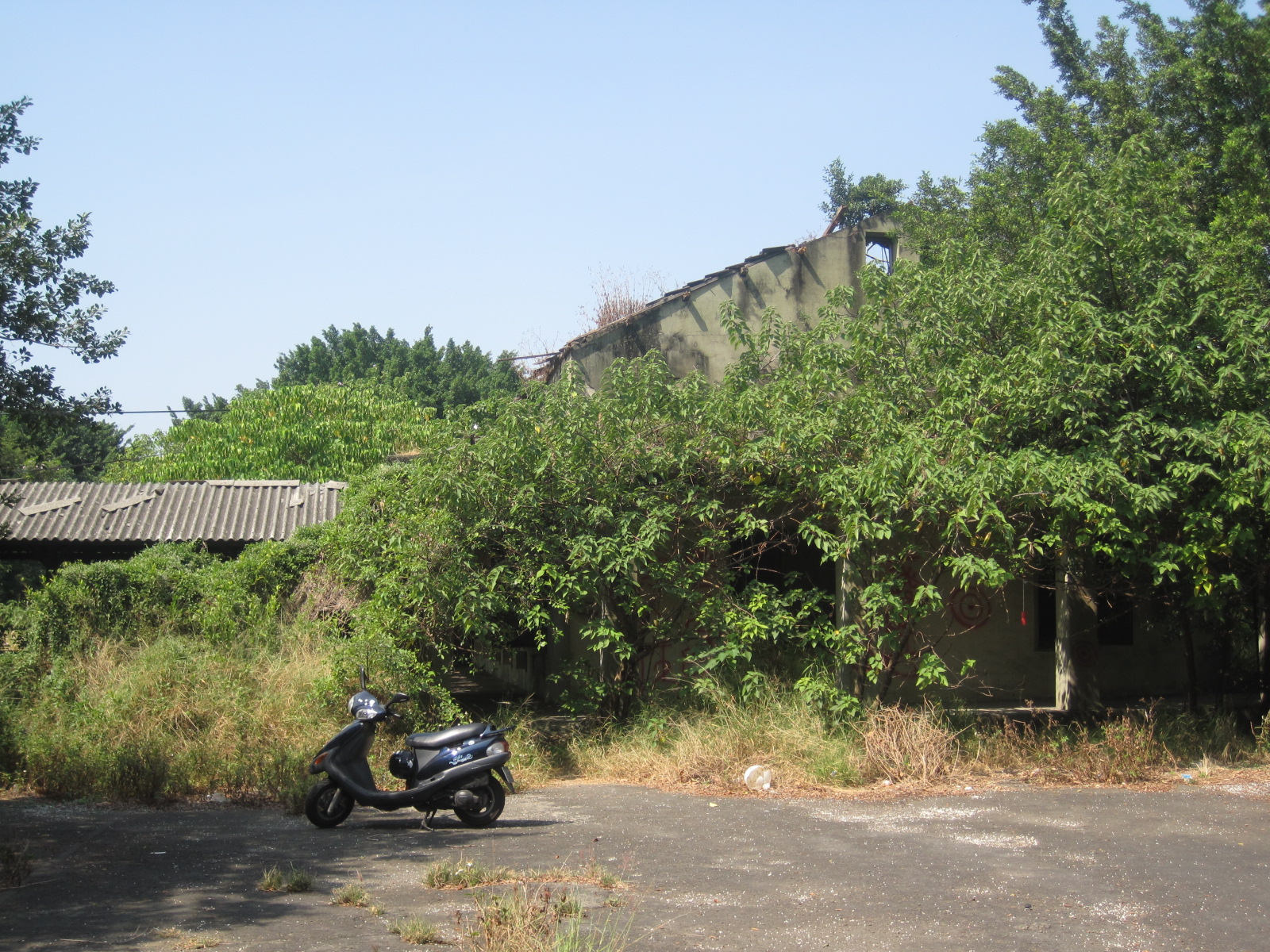 中文（台灣）: 永康飛雁新村建立之前便已存在的建築物，據傳原是日軍的通訊所。